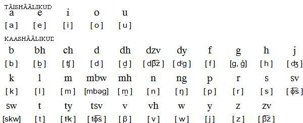 Šona keele häälikud